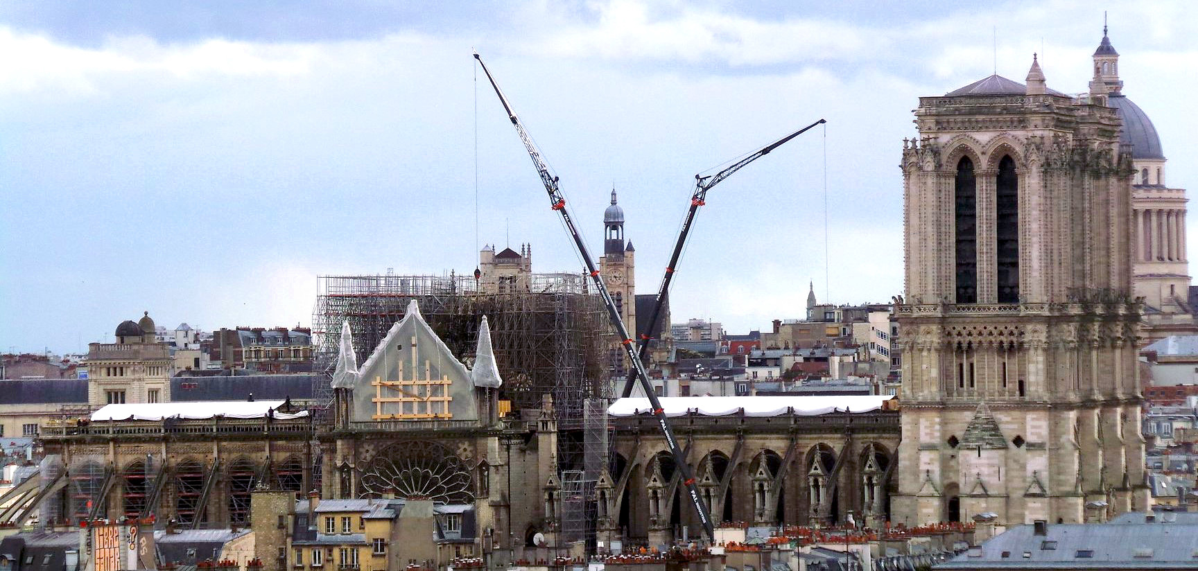 La mise hors d'eau de la cathédrale est en bonne voie : la nef est en grande partie bâchée ainsi que le pignon nord fragilisé à cause de l'incendie et de l'eau. Photo prise à partir de la terrasse du centre Pompidou.